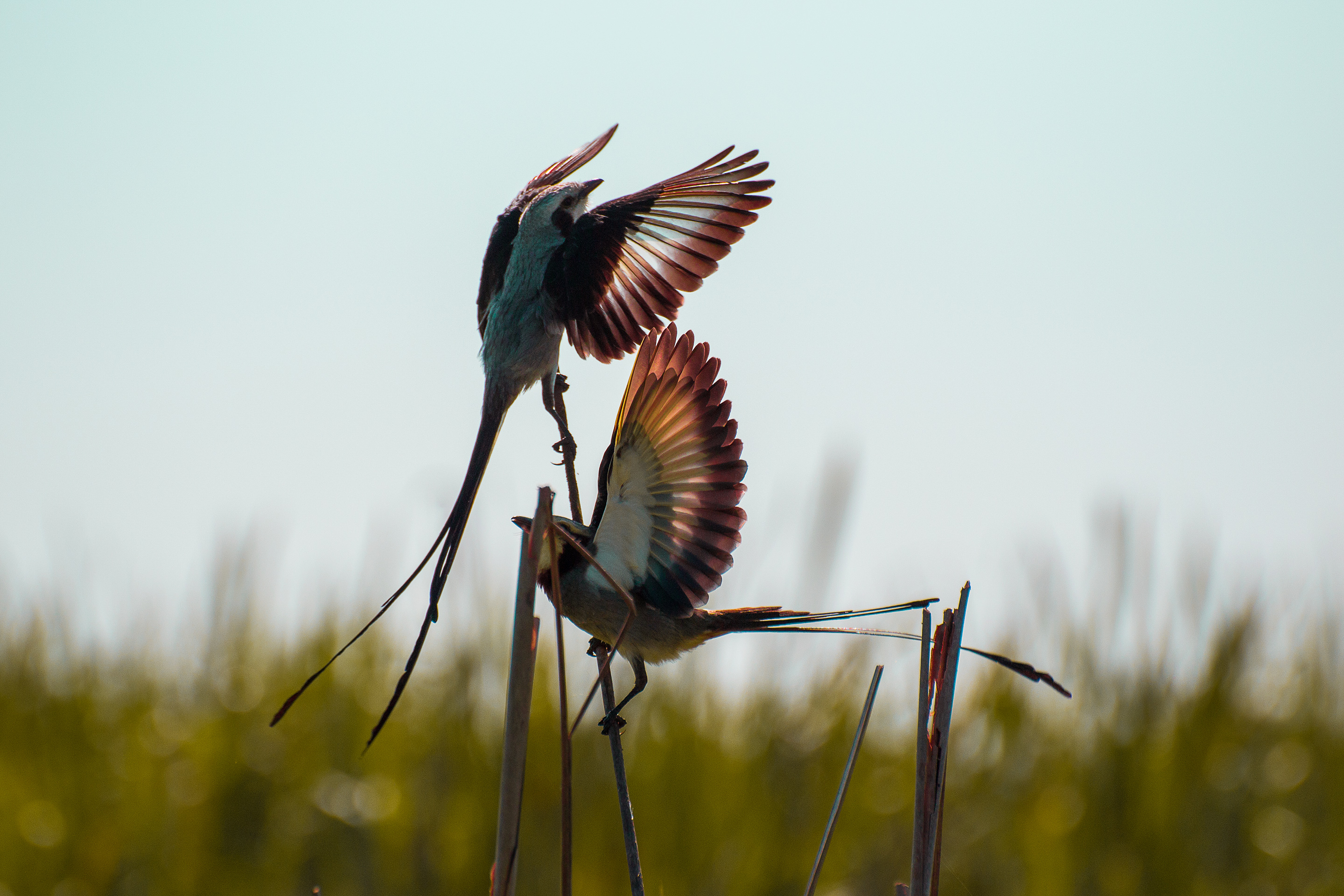 O casal "vocalizava" bastante quando foram flagrados no Tanquã em Piracicaba - SP. Para quem não conhece é um vilarejo de pescadores próximo à cidade, considerado um "mini pantanal", que abriga diversas espécies de aves. Nome Científico: Gubernetes yetapa. Nome Inglês: Streamer-tailed Tyrant. A tesoura-do-brejo pertence a maior família de aves exclusivamente neotropicais. A espécie ocupa brejos, campos úmidos e buritizais, ocorrendo no Brasil da Bahia ao Rio Grande do Sul e na Bolívia, Paraguai e Argentina. Alimenta-se principalmente de insetos. Ocorre da Bahia e Minas Gerais ao Rio Grande do Sul.